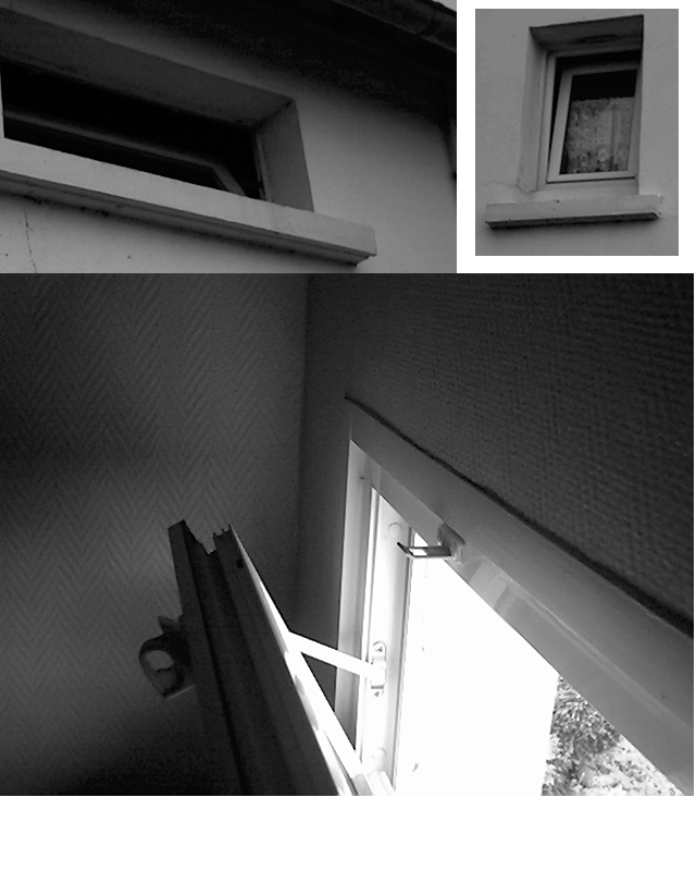 Vasistas : vue intérieure et extérieure; un compas limite l'angle d'ouverture. Shots from inside and outside; a compass limits the opening.